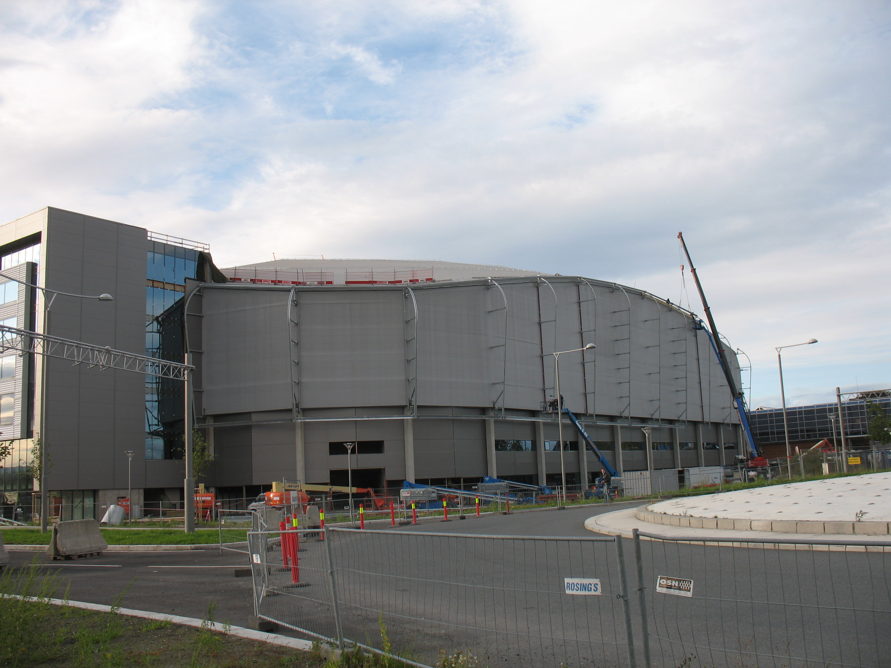 Telenor Arena på Fornebu under bygging.